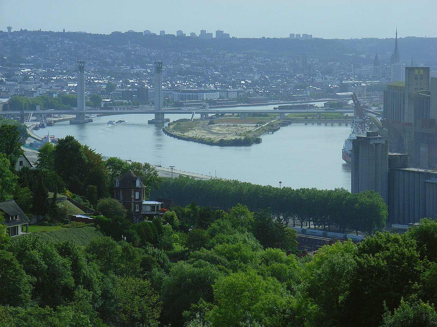 Blick über die Seine und Rouen vom Place Gustave Prat, Canteleu, Fr